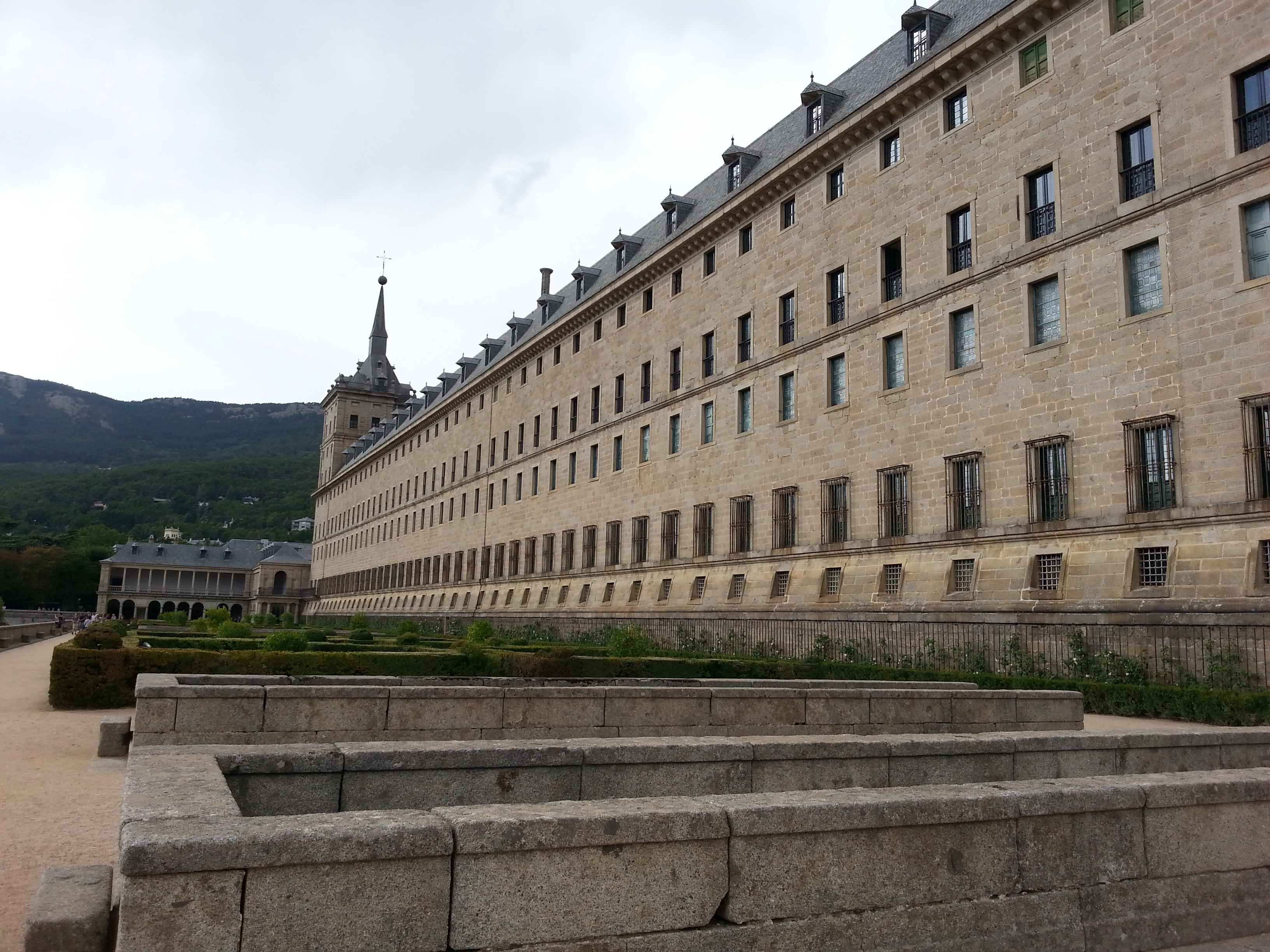 De izquierda a derecha: Galería de Convalecientes y Fachada Sur del Monasterio de El Escorial.